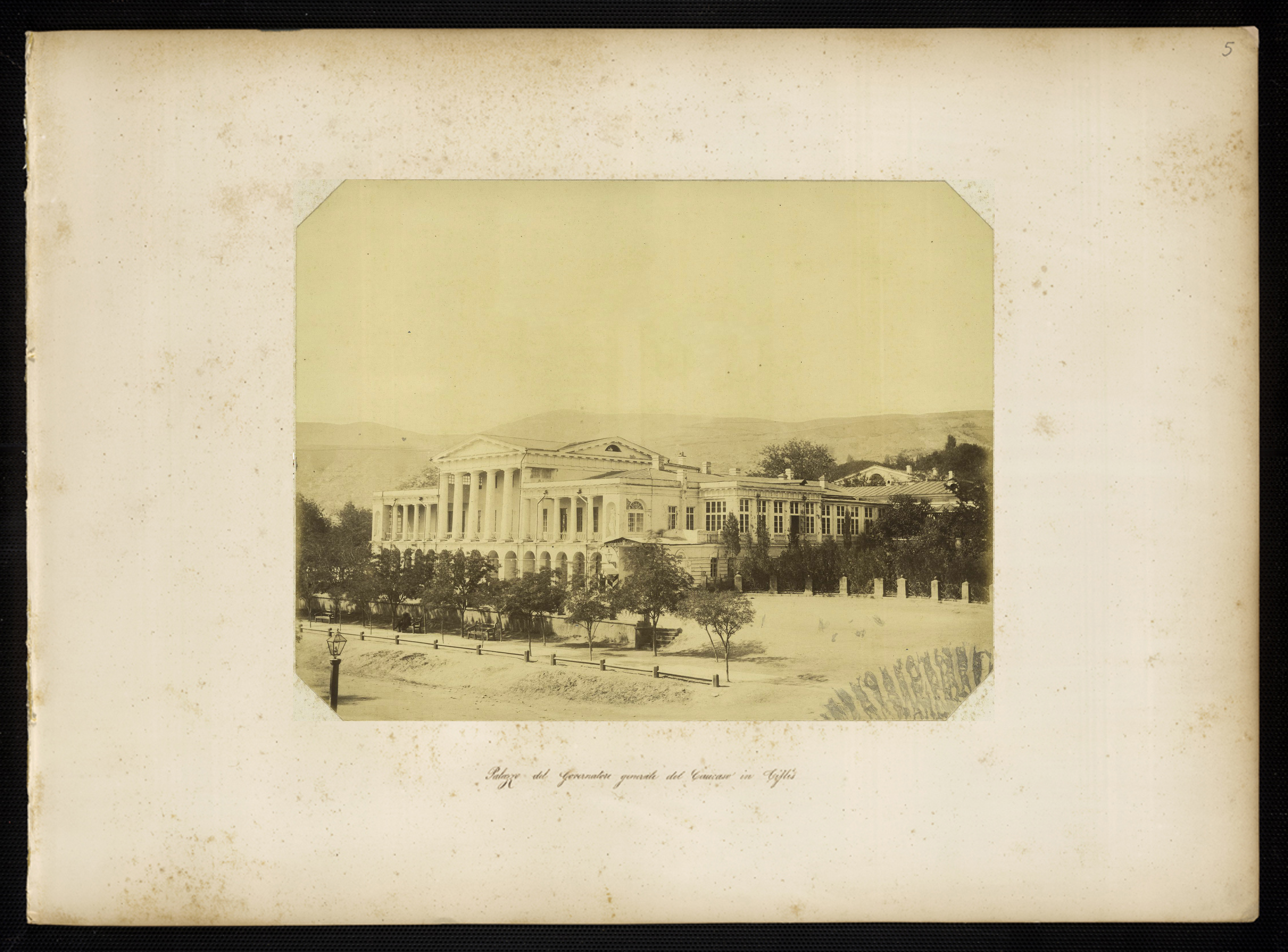 Montabone, Luigi - Palazzo del governatore generale del Caucaso in Tiflis